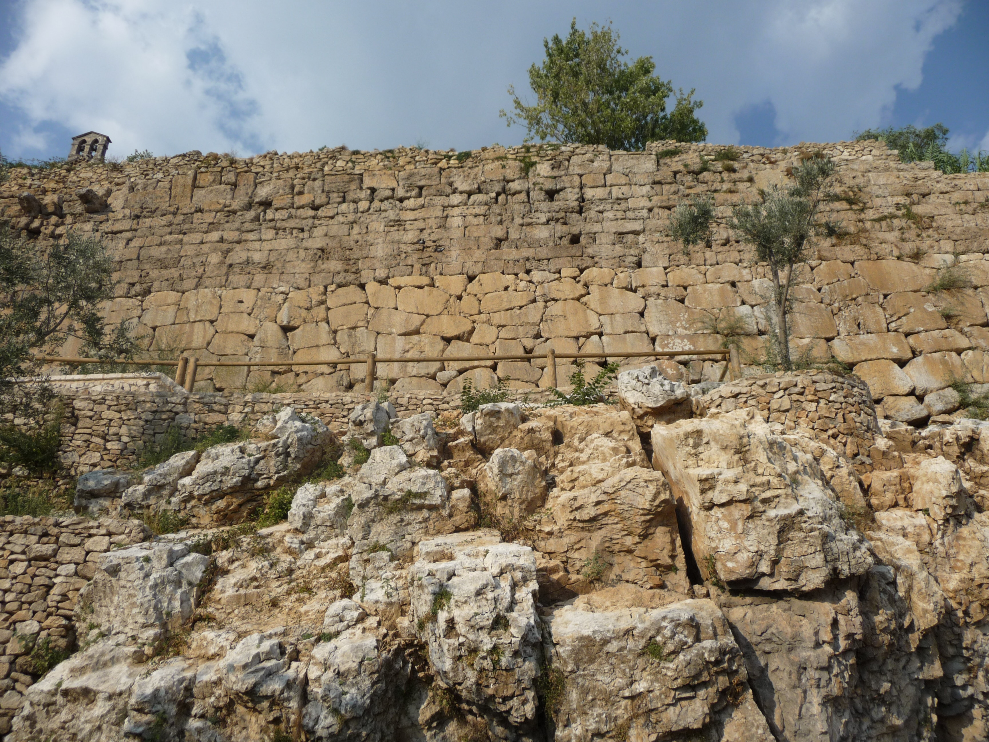 La cinta muraria ad Est di Porta Sanguinaria